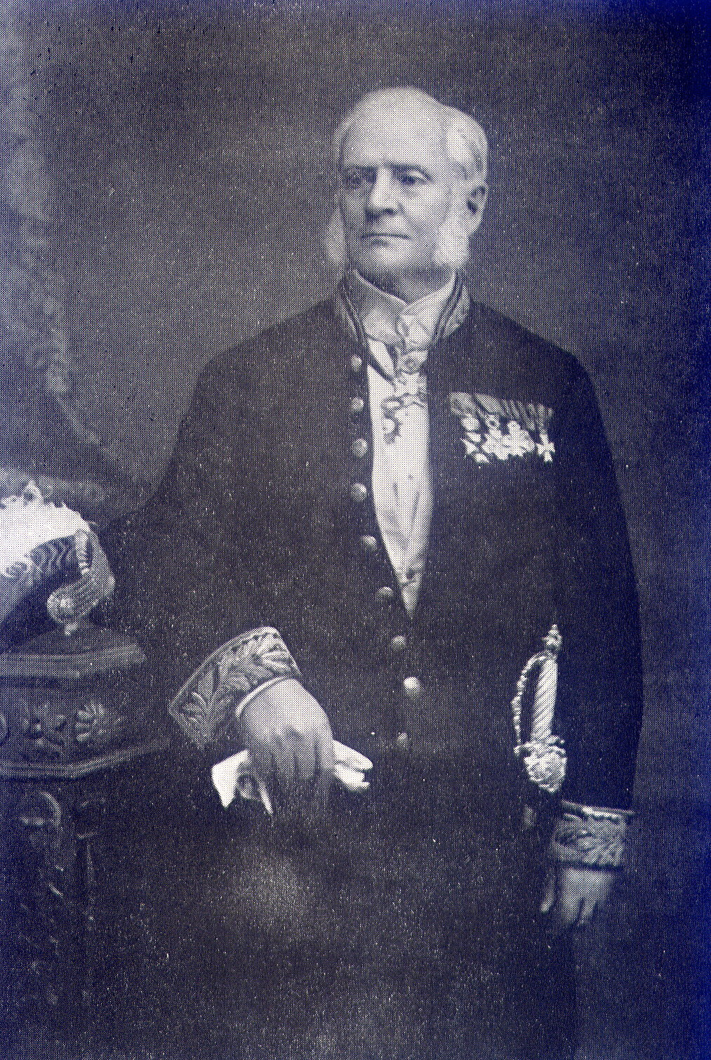 Photo du docteur Arsène Pigeolet médecin belge au XIXème siècle.